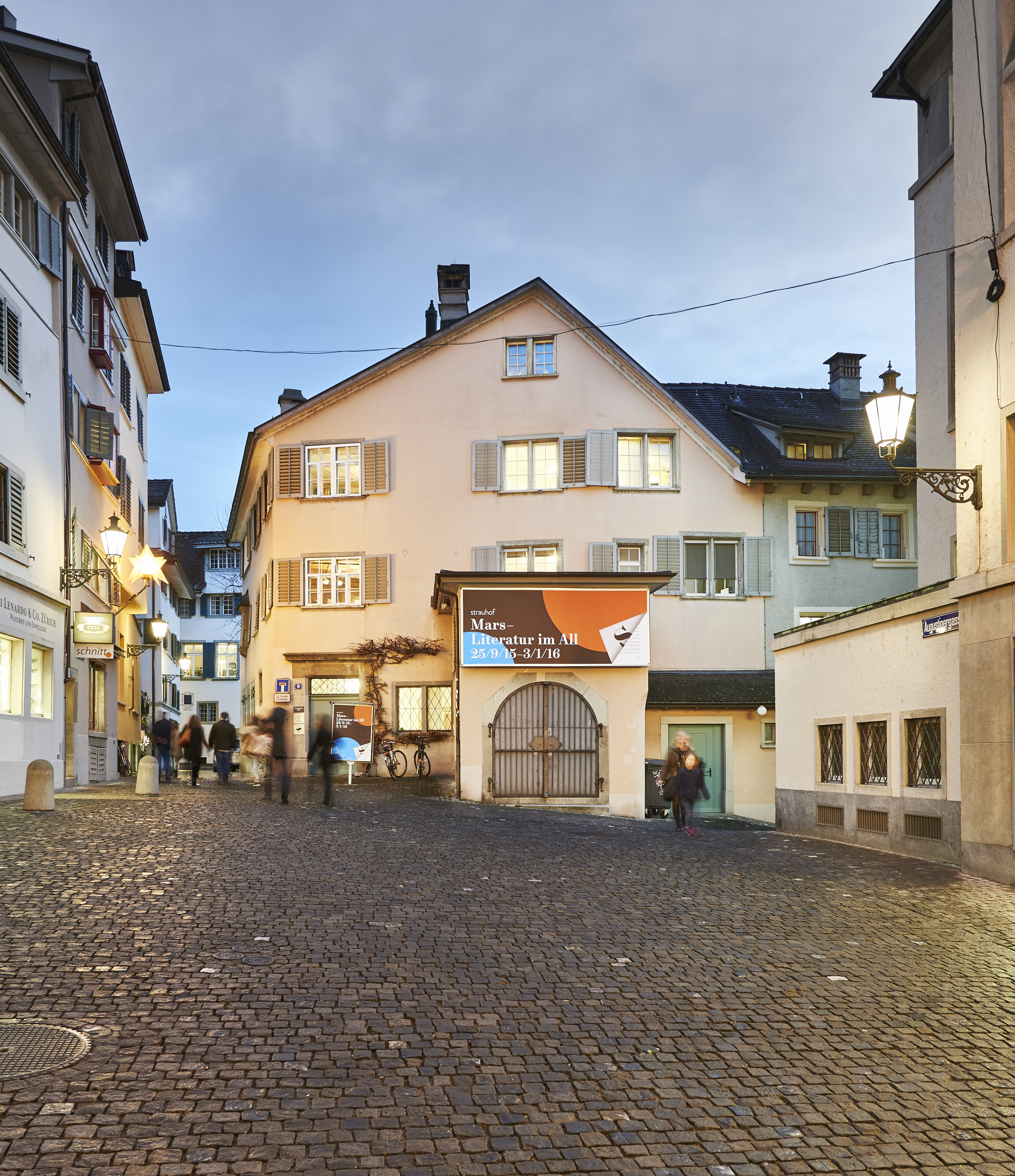 Aussenansicht Strauhof